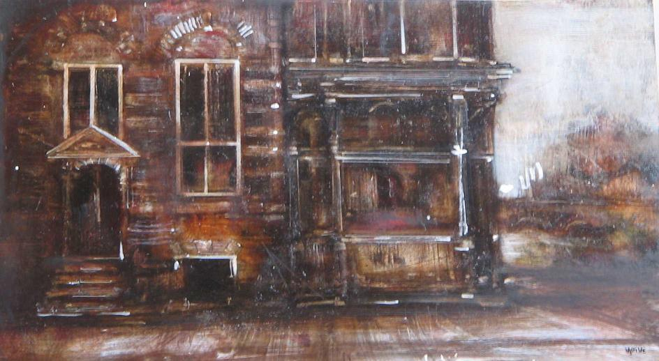 Tableau d'une maison